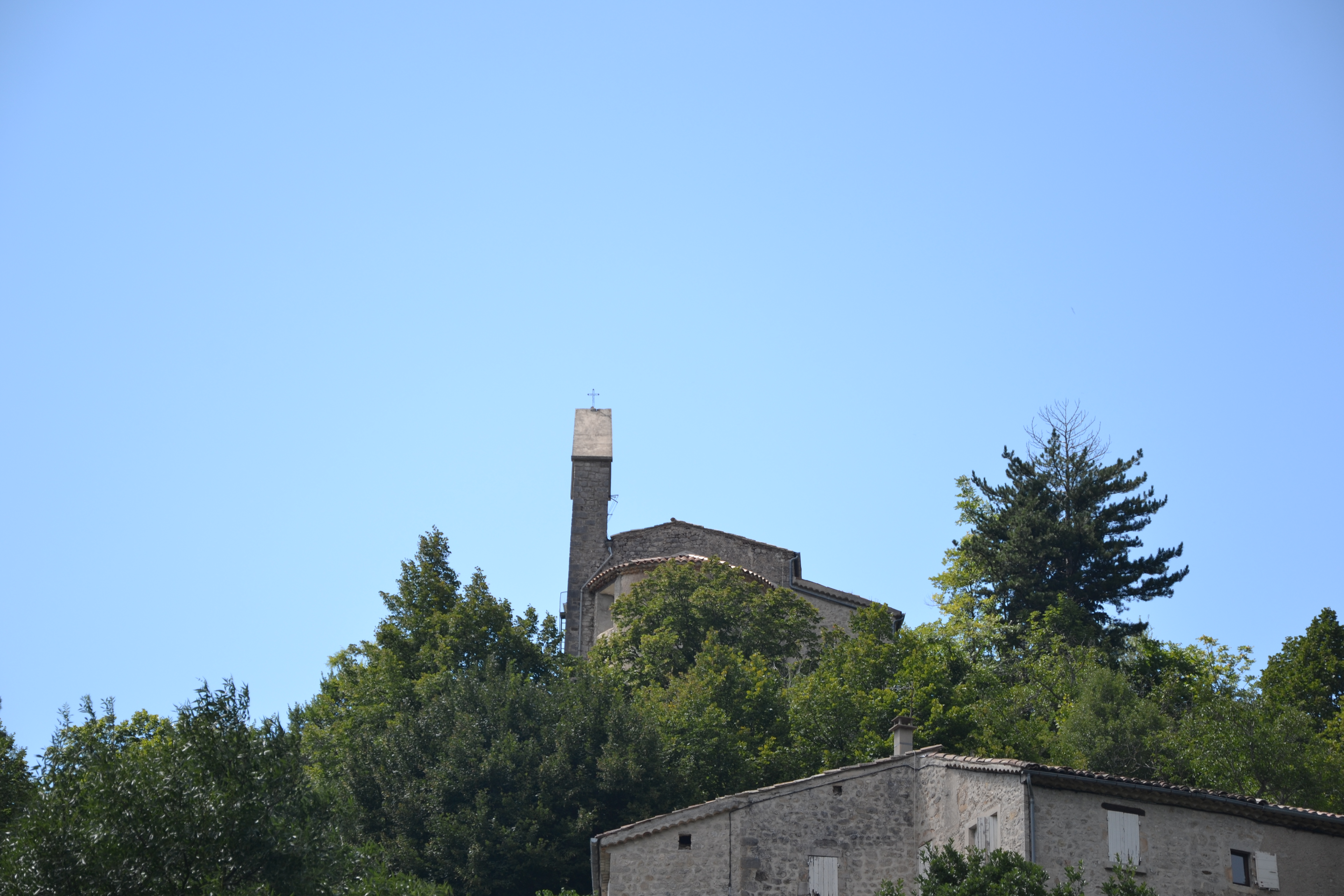 église de Cornillac